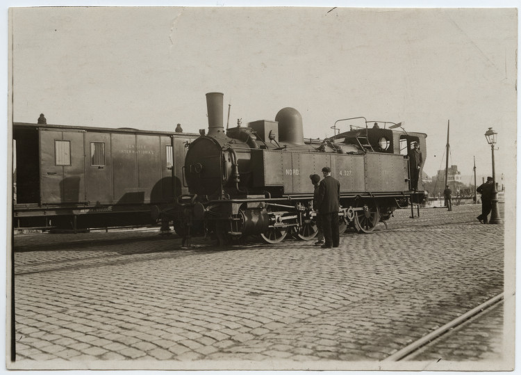 Loco à la gare de Boulogne-Maritime durant La grève des cheminots en 1920 Title: Boulogne maritime station during railroad strike Creator: Thompson, Paul Date: ca. 1920 Place: Boulogne, France Part Of: David Goodyear collection of foreign railroad photographs Description: The 0-8-0 tank engine shown in this photograph began life as an 0-8-0 tender engine in 1872. Here, engine No. 4.327 sits cold at the Boulogne Maritime Station during a railway strike in 1920. Source: Collyns, Adrian H. Northern Steam Vapeurs du Nord. DeGolyer Library, Southern Methodist University, 2003. Physical Description: 1 photograph: black and white; 12 x 17 cm. File: ag1983_0266_24_01_08r_boulogne_sm_opt.jpg Rights: Please cite Southern Methodist University, Central University Libraries, DeGolyer Library when using this image file. A high-quality version of this file may be obtained for a fee by contacting . For more information, see: View Railroads: Photographs, Manuscripts, and Imprints